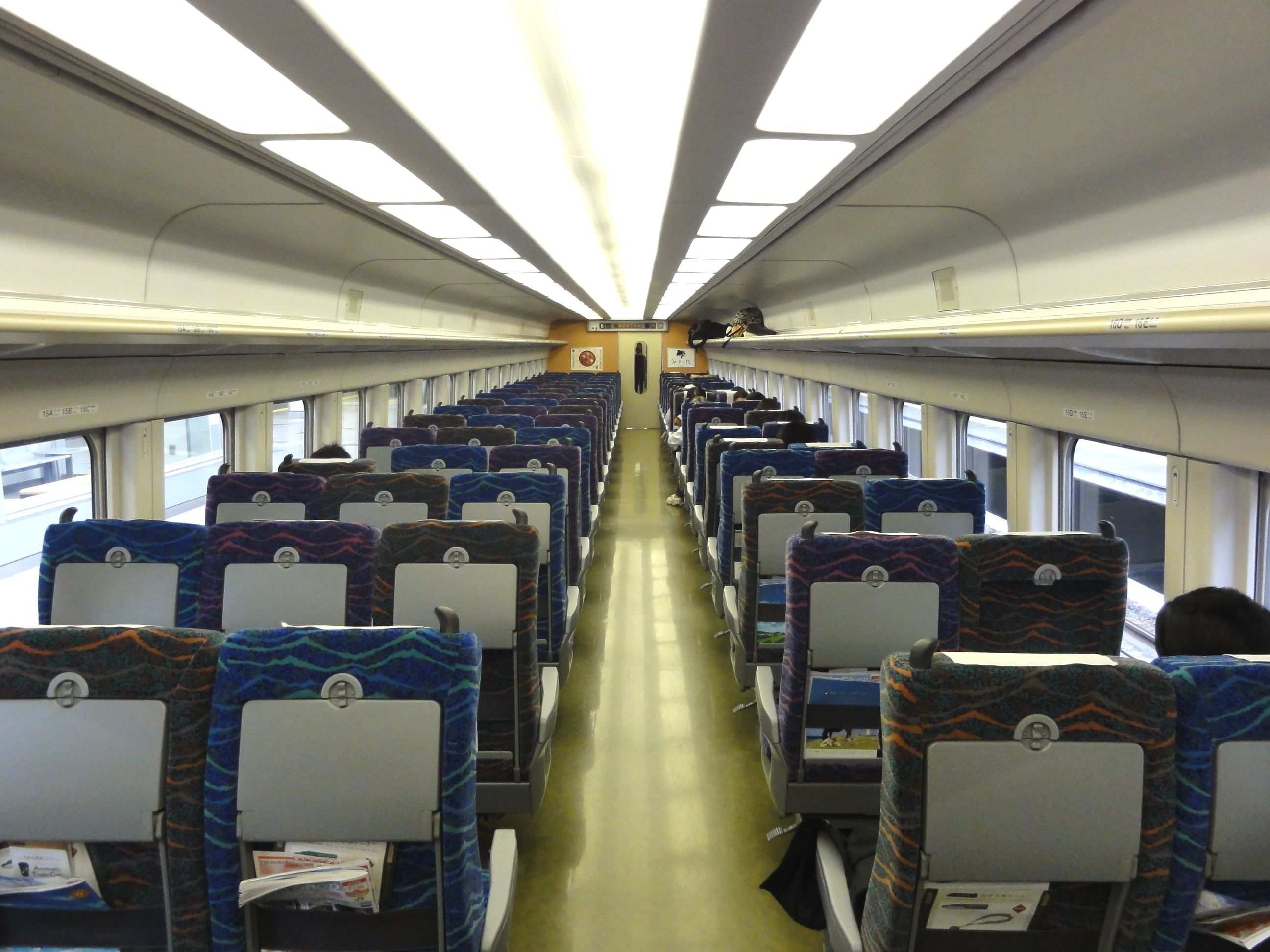 新幹線E2系電車・N1編成車内